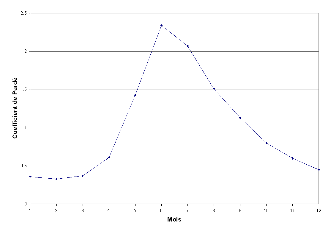 Coefficients de Pardé pour la Albula à Tiefencastel. Courbe représentative d'un régime nivo-glaciaire. Période de mesure : 1951 - 1980